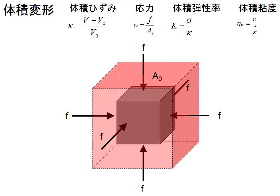 単純な体積変形のモデル。V_0は元体積、Vは変形後体積、κは体積ひずみ、fは力、A_0は変形前における表面積、σは応力、Kは体積弾性率、η_Vは体積粘度、上にドットの付いたκは体積ひずみの時間微分である。